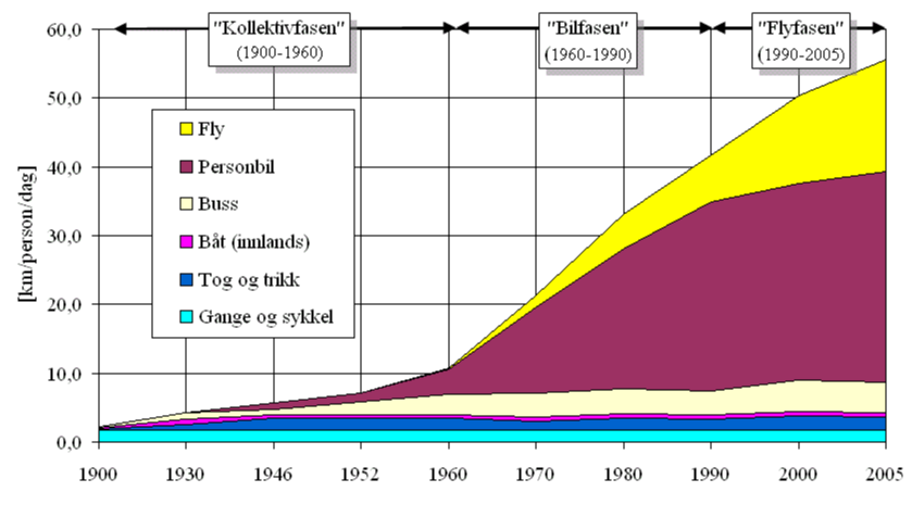 Nordmenns personreiser, 1900-2005 (Kilde: Erling Holden, 2009, Transport og miljø, Tapir Akademisk Forlag